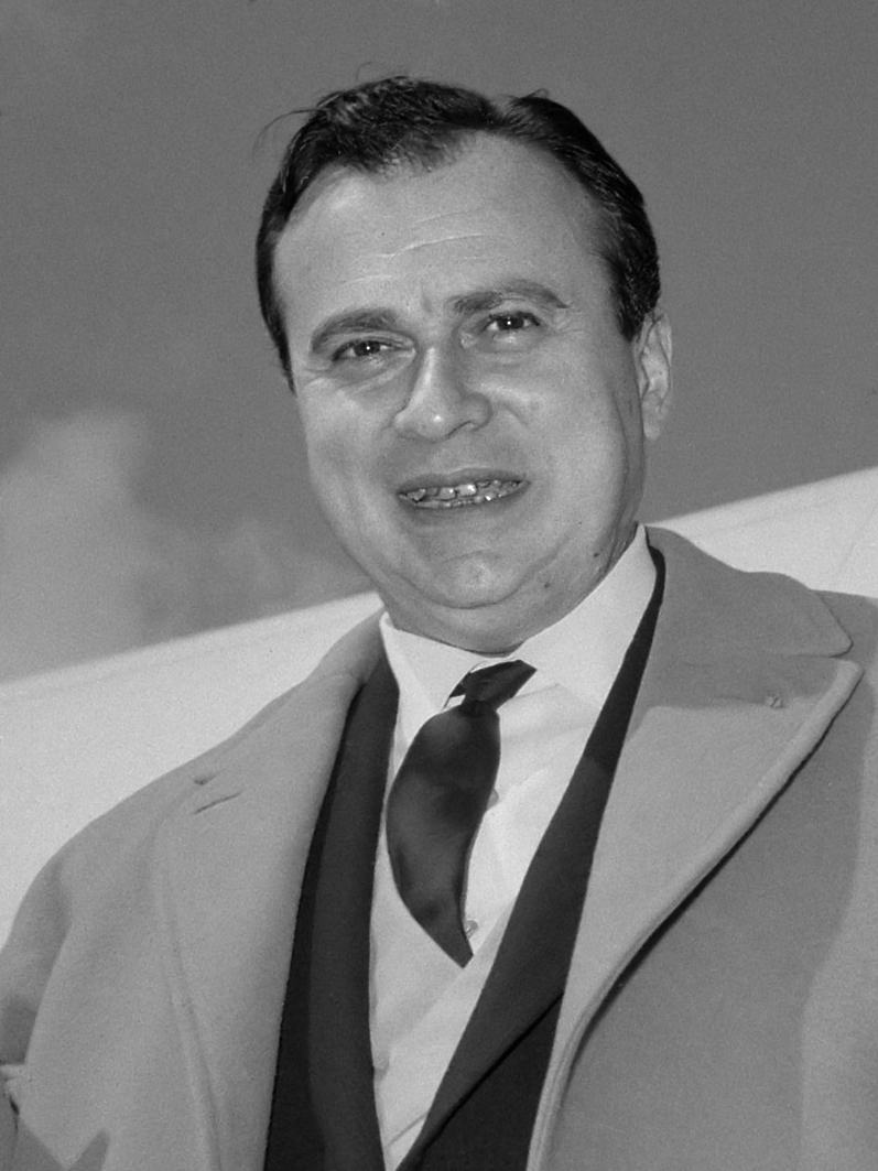 Aankomst Henryk Szeryng op Schiphol, 1 juli 1964